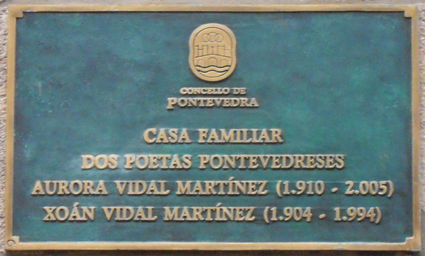 Placa na casa familiar dos poetas pontevedreses Aurora e Xoán Vidal Martínez, na rúa dos Soportais de Pontevedra.